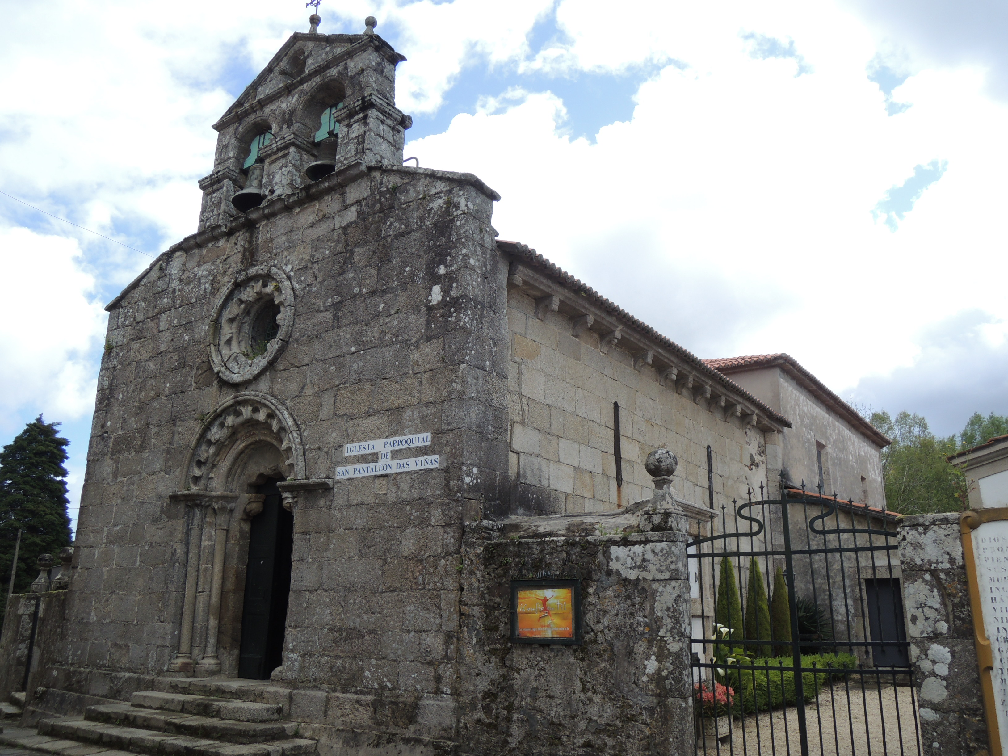 Iglesia de San Pantaleón das Viñas